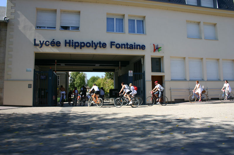 Vue du Velotour 2007, Lycée Hippolyte Fontaine, Dijon